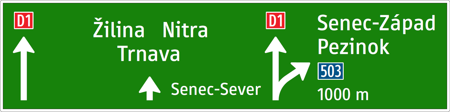 IS 3 - Návesť pred križovatkou (trojpruh; prípojka, dva ciele)